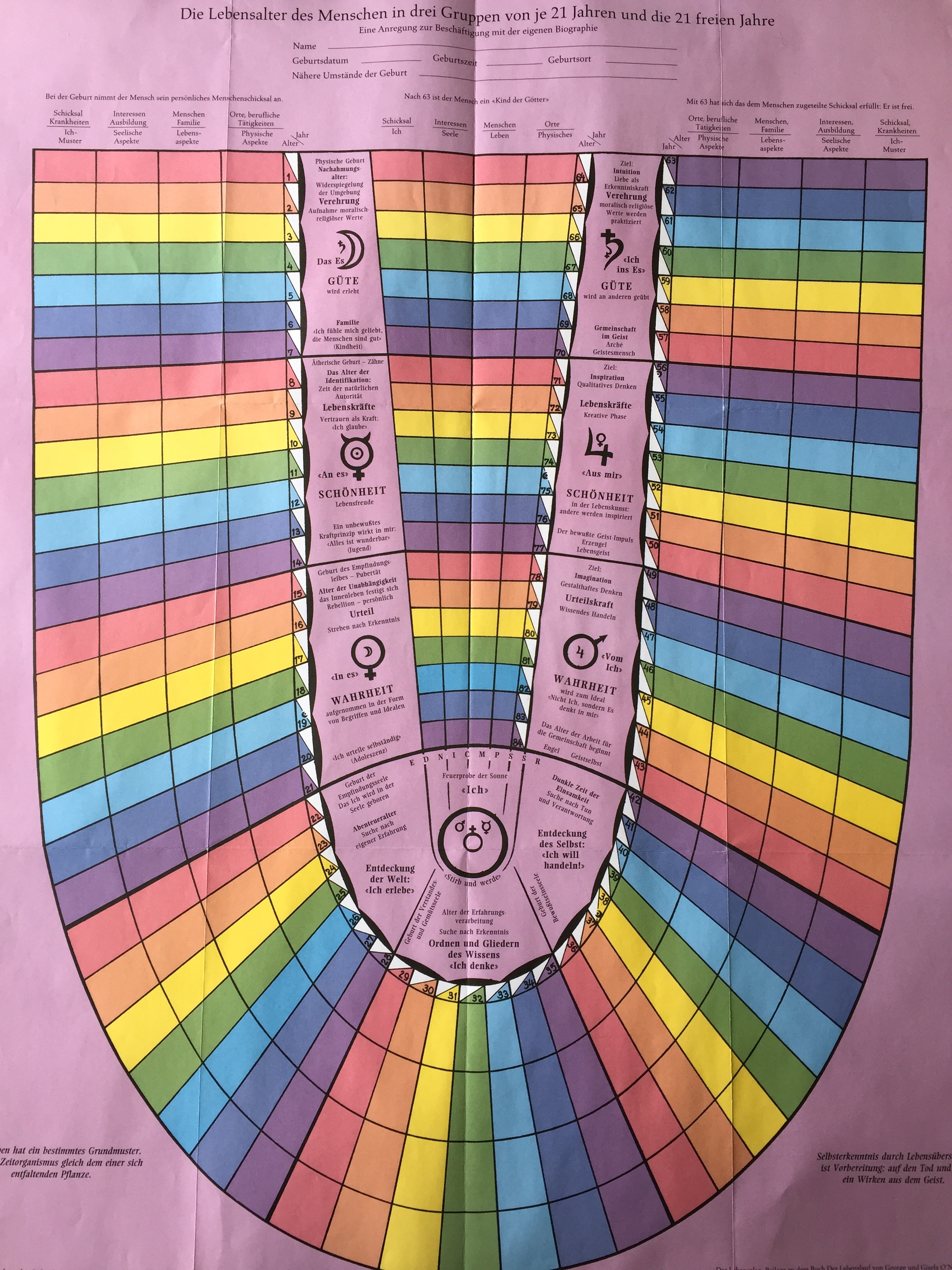 Bijlage bij The Human Life, George en Gisela O'Neill